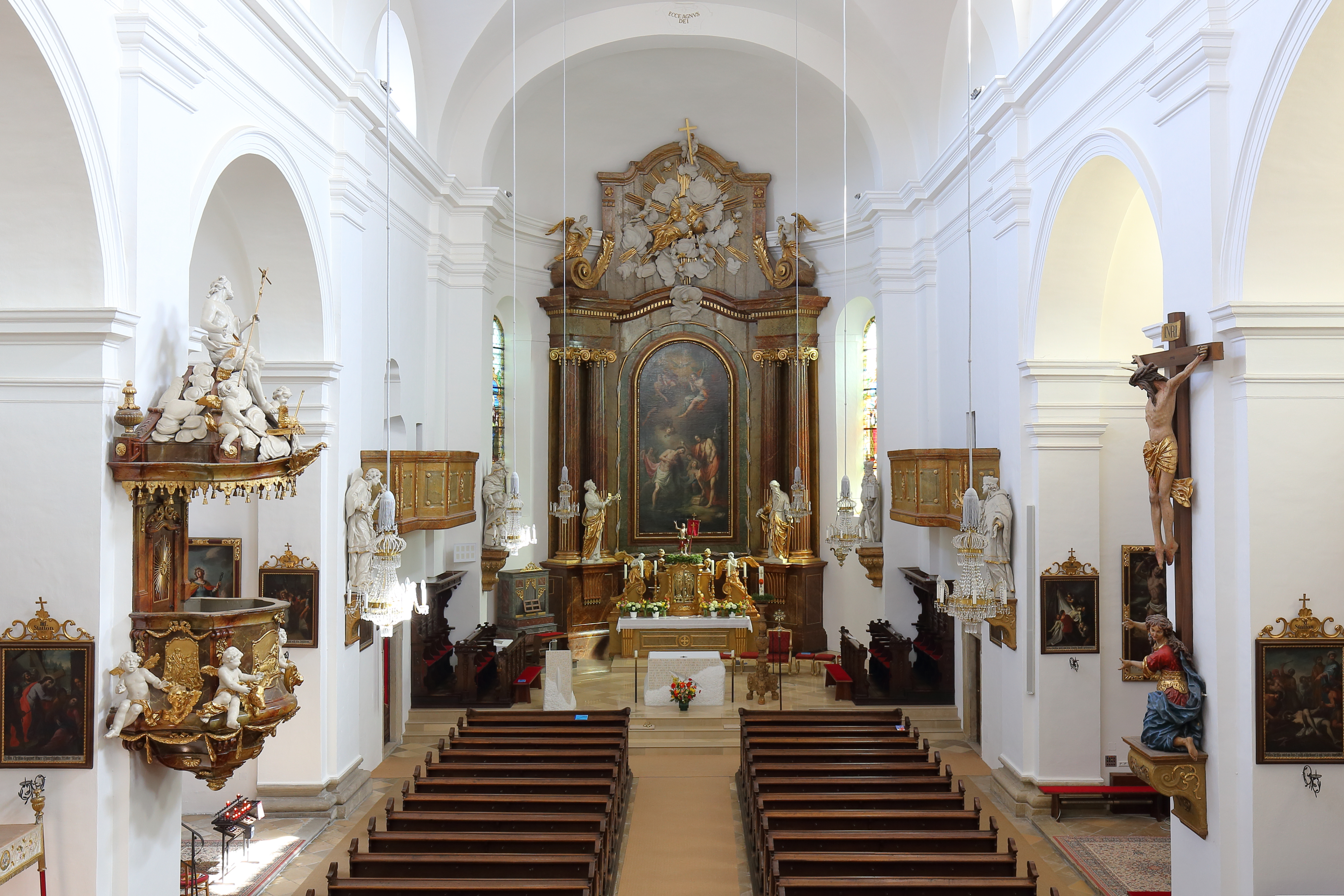 Innenansicht der römisch-katholischen Pfarrkirche hl. Johannes der Täufer in der niederösterreichischen Stadt Poysdorf. Die spätbarocke Einrichtung stammt vorwiegend aus dem 3. Viertel des 18. Jahrhunderts und wurde 1924 zum Teil verändert.